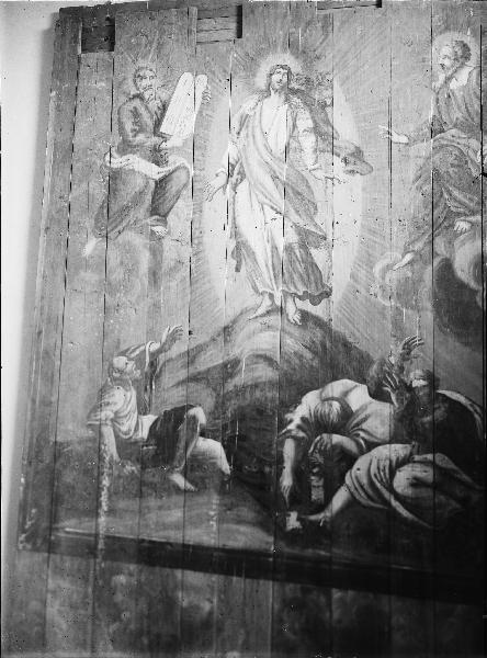 Äldre takmålning, Kristi förklaring, 1700-talet. Efter rengöring, före påbättring av målningen. Kategori: (03) Målningar på träÄldre takmålning, Kristi förklaring, 1700-talet. Efter rengöring, före påbättring av målningen.